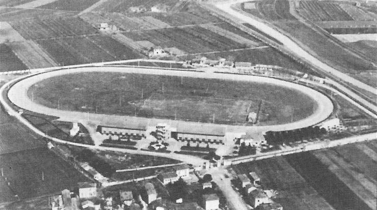 Il primo campo da calcio del Cesena era stato ricavato all'interno dell'anello ippico dell'Ippodromo del Savio